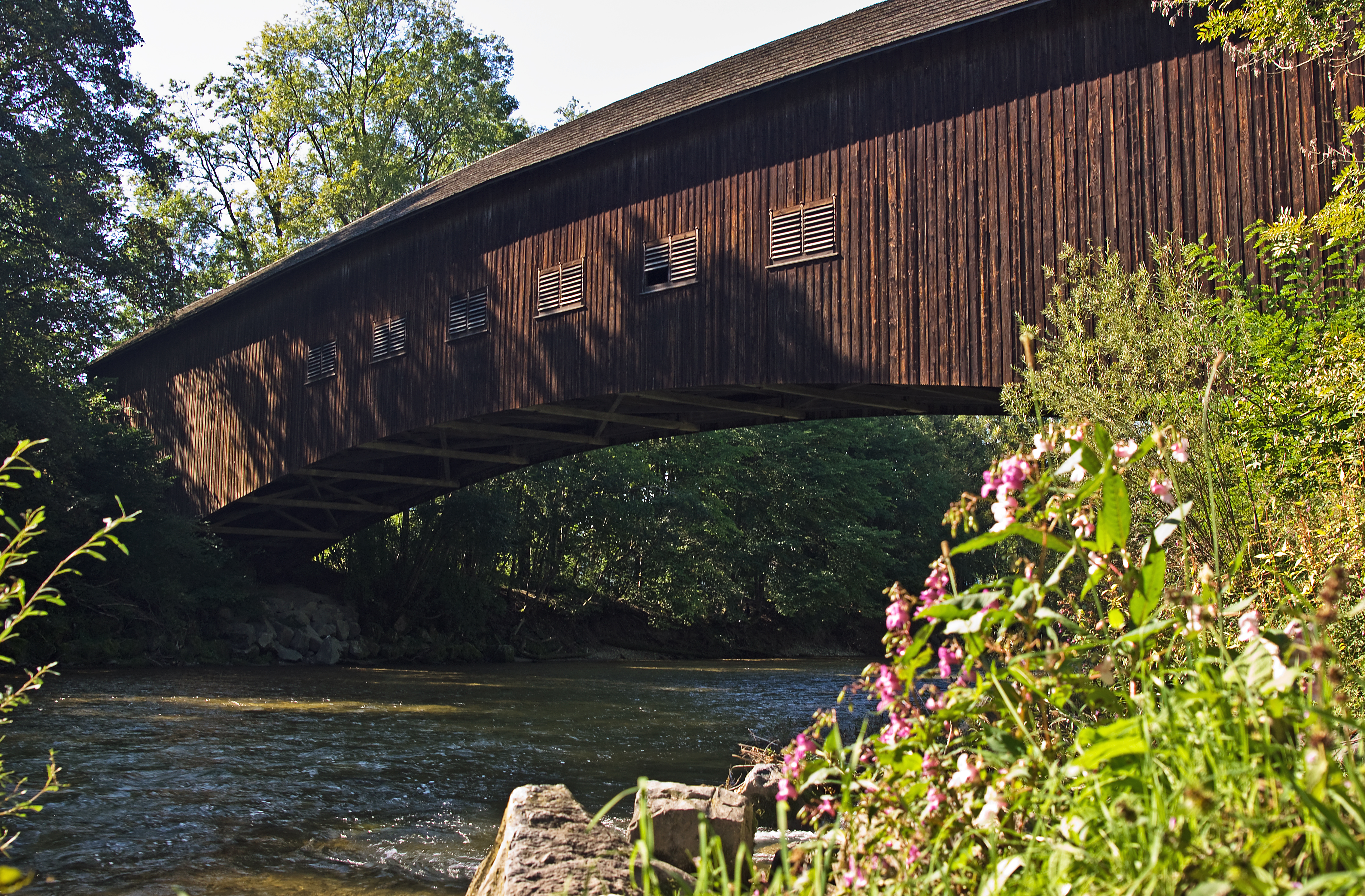 Hasle bei Burgdorf, alte gedeckte Holzbrücke über die Emme